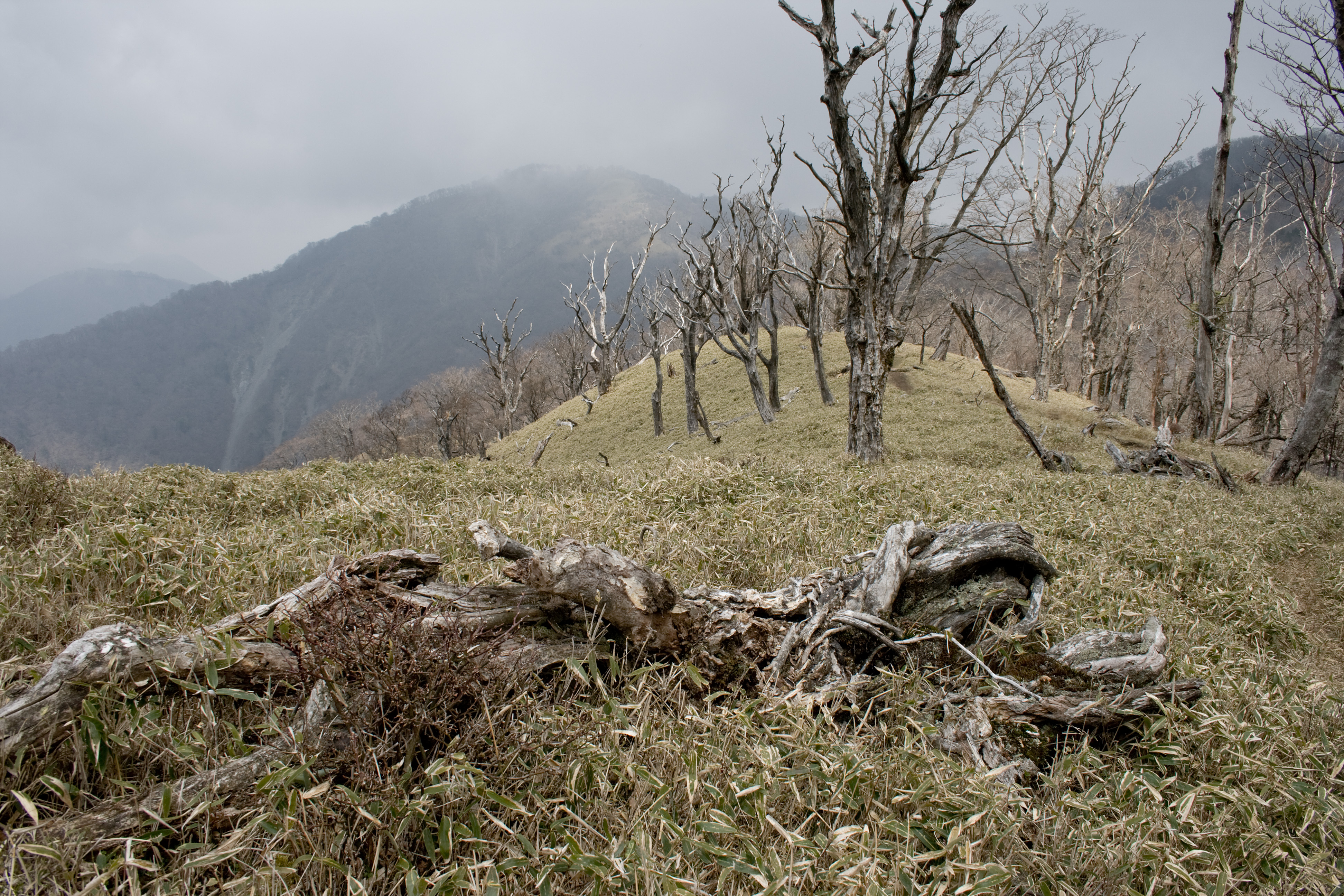 酸性雨によって枯れた木々 (神奈川県・竜ヶ馬場)